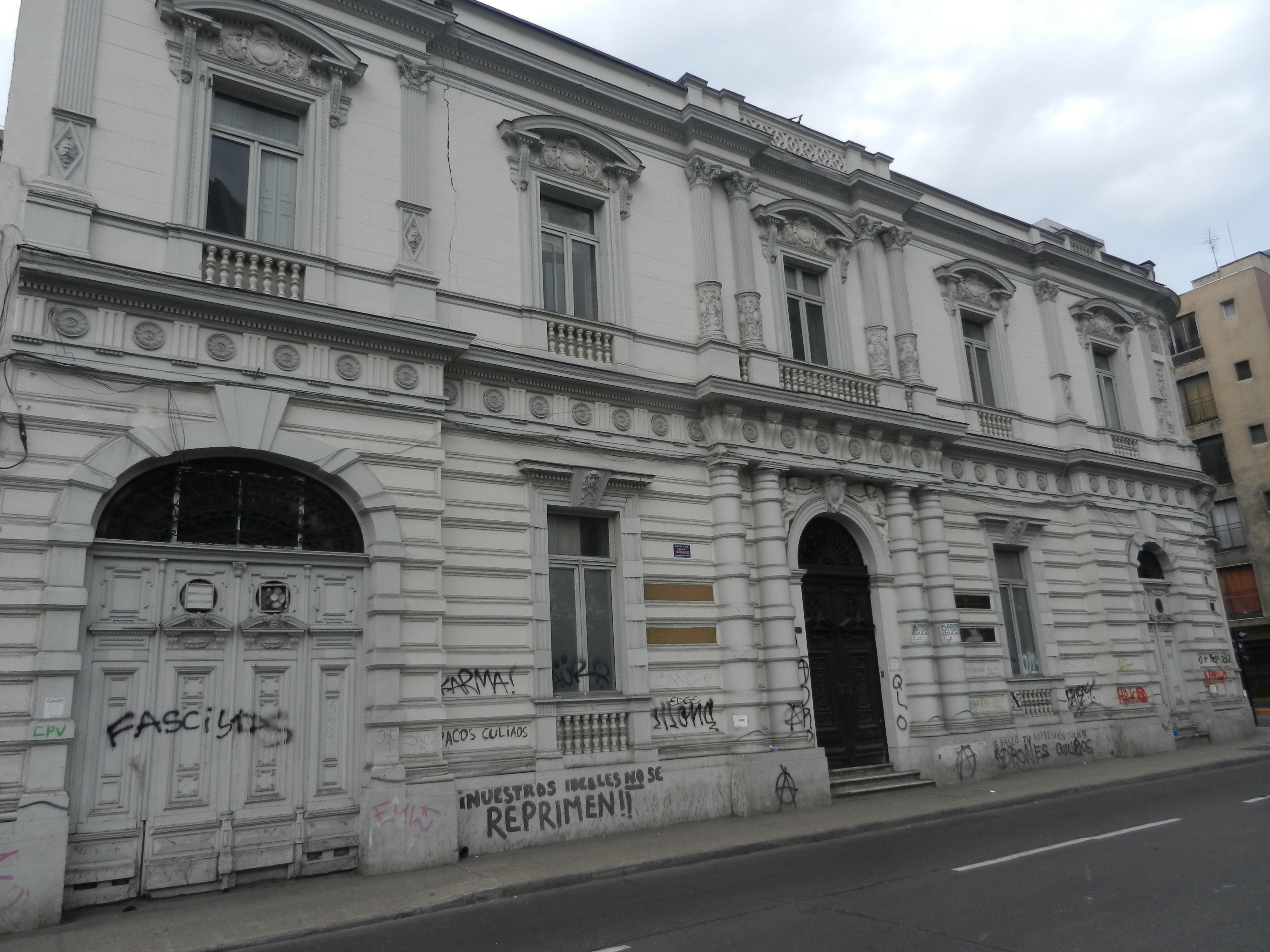 Palacio Matte This is a photo of a national monument in Chile: 889